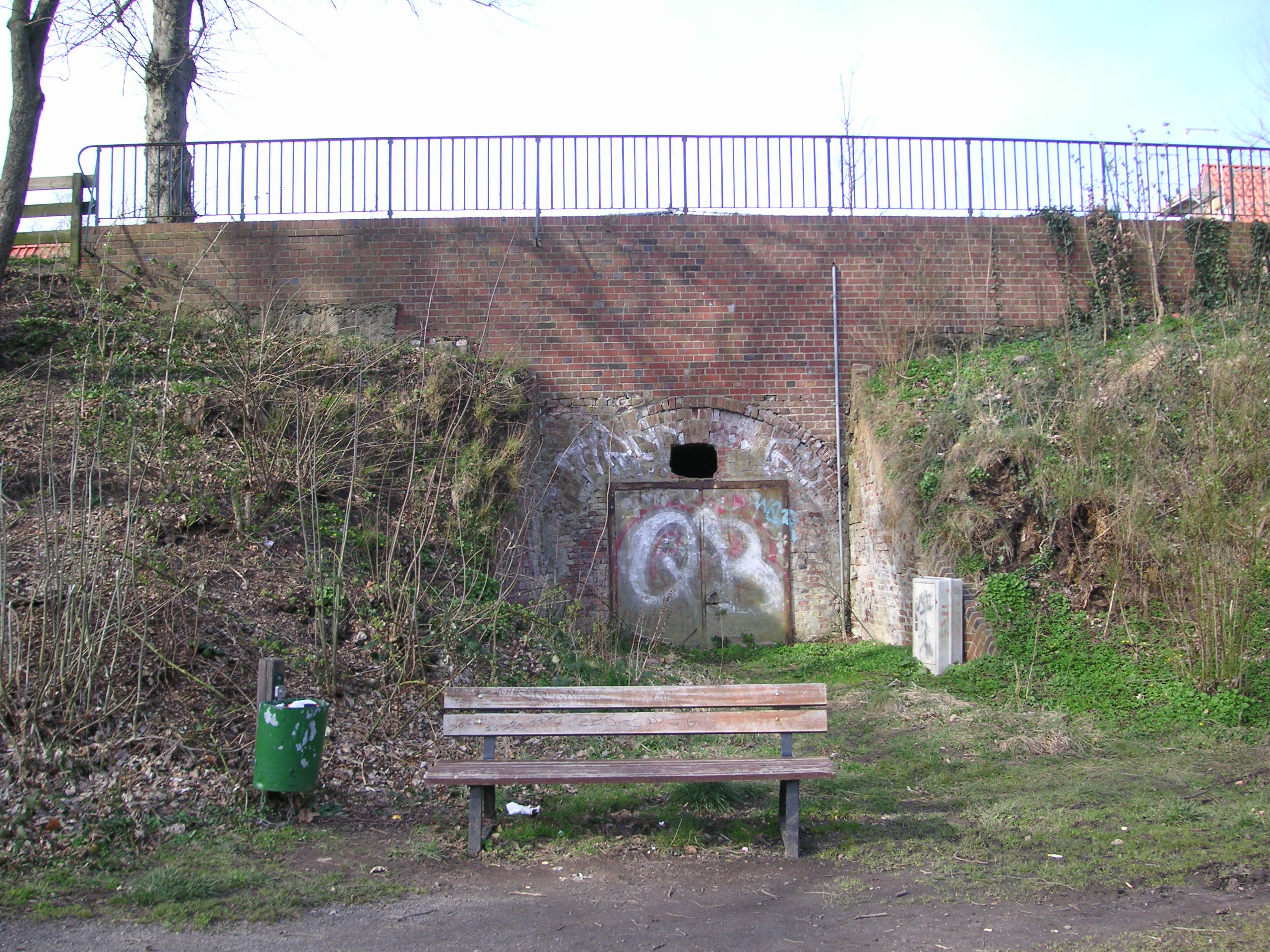 Zugemauerter Tunnel zwischen Horstsee (Stade) und dem Gebiet der ehemaligen Aktien-Ziegelei Horst, jetzt Baugebiet Am Horstsee